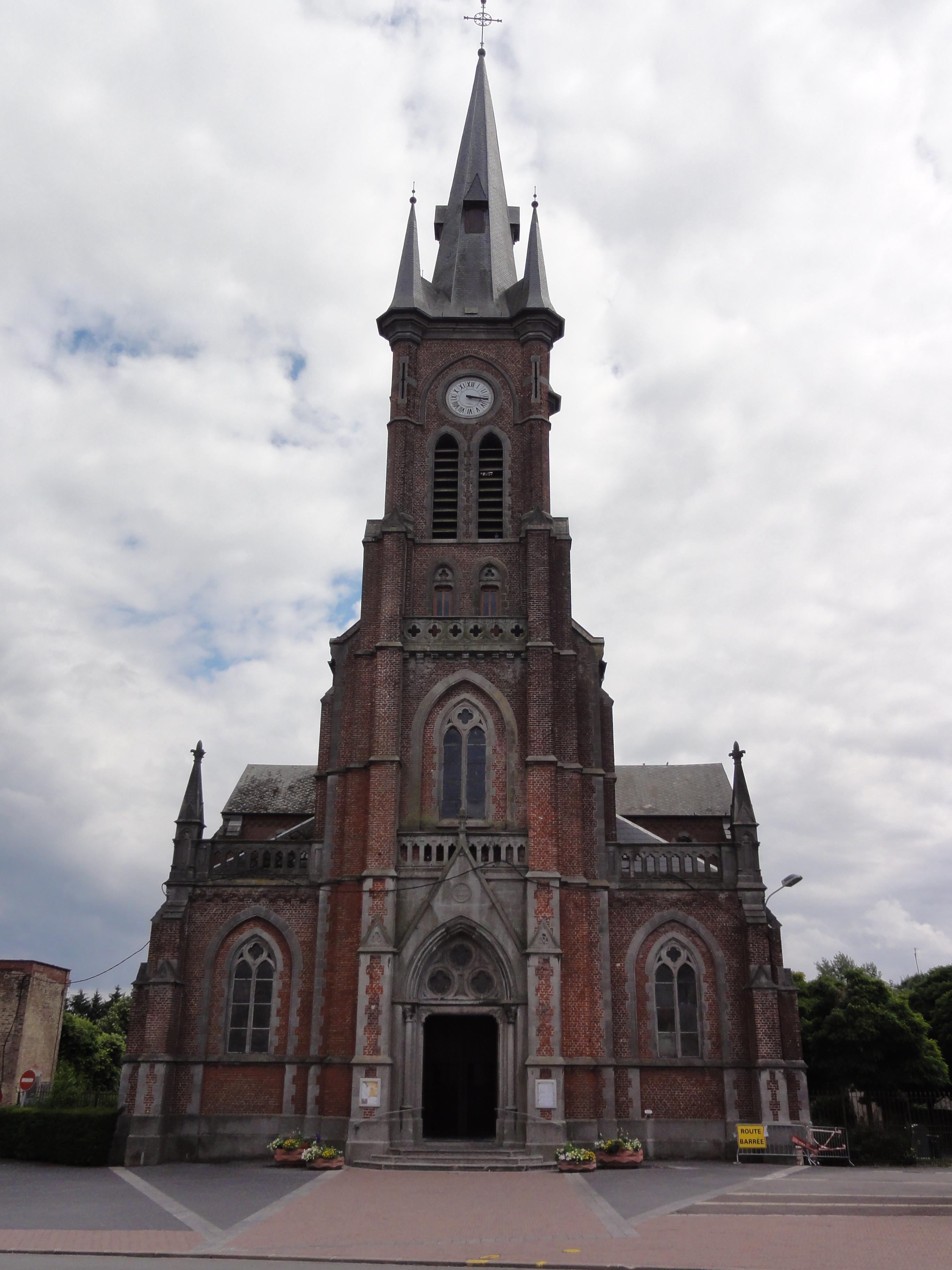 Wignehies (Nord, Fr) église, façade